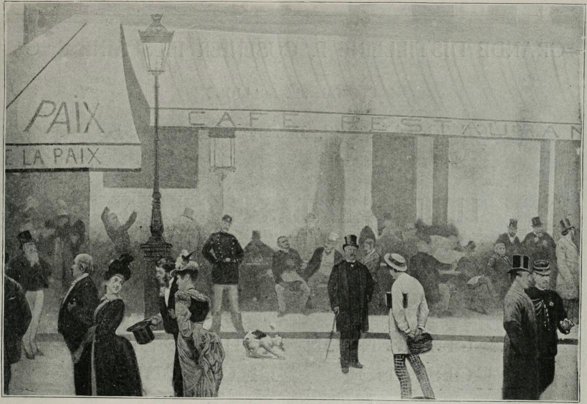 Planche du livret explicatif du panorama le "Tout-Paris" peint par Charles Castellani et présenté lors de l'exposition universelle de 1889.